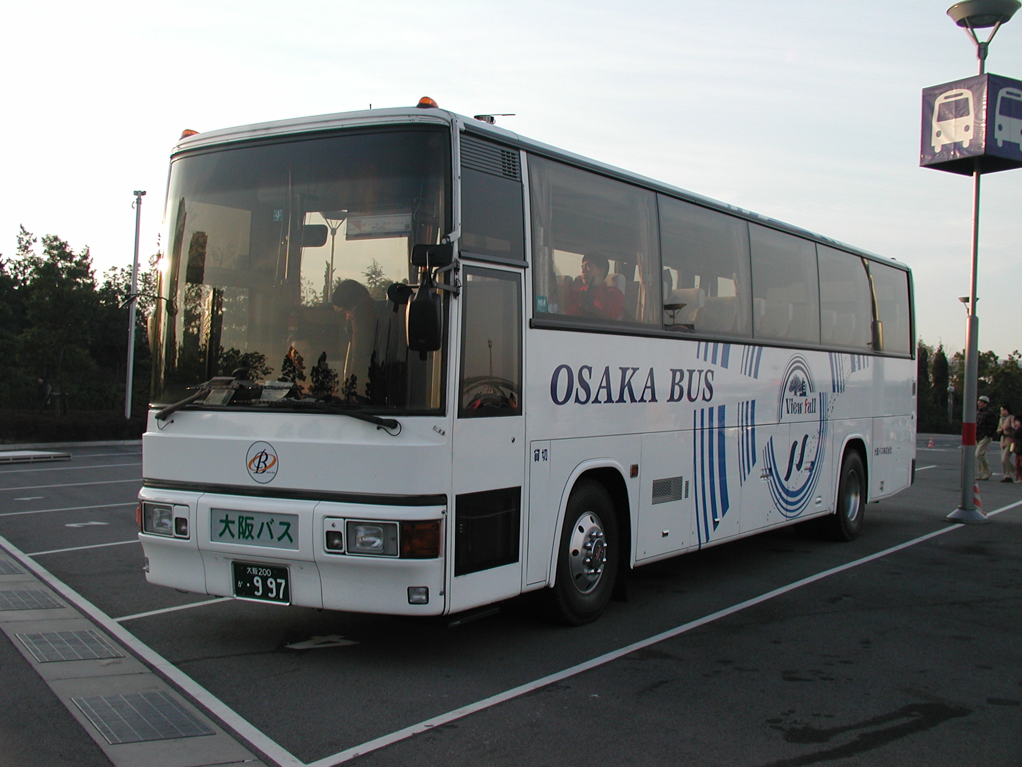 大阪バスの貸切車「ビューフル45」。旧・大阪西鉄観光バスからの承継車。 型式：三菱ふそう・エアロクイーン U-MS729S 車体：西日本車体SD-ＩＩ 登録番号：大阪200か・997 撮影地：大阪市此花区、ユニバーサルスタジオジャパン